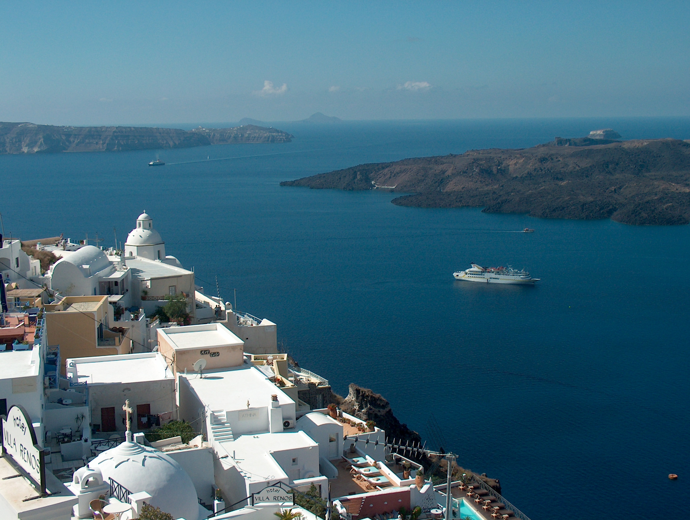 Santorin mit Blick in die Caldera mit der Vistamar.